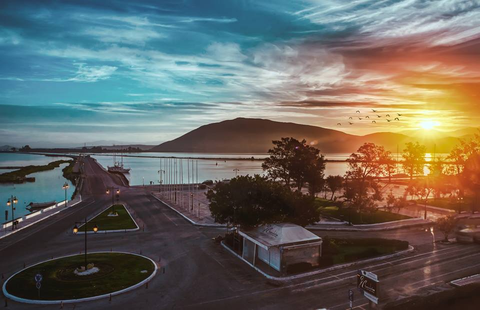 Λευκάδα δρόμος είσοδος, Ανατολή